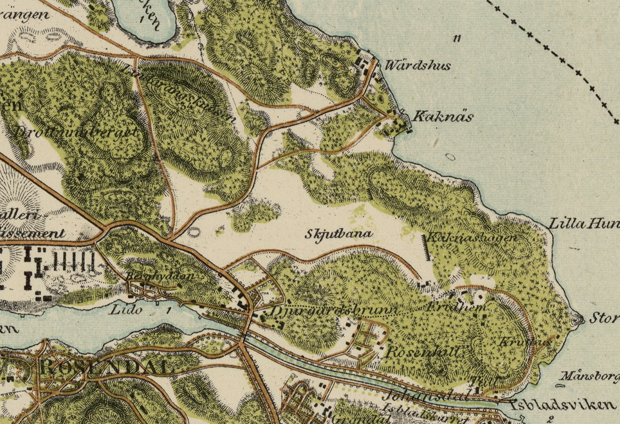 Del av "Trakten omkring Stockholm" visande Kaknäs skjutbana (uppdaterad från 1861)